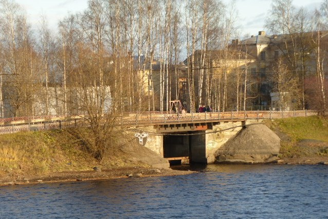 Мост имени купца Марка Пименова через р. Лососинка в Петрозаводске